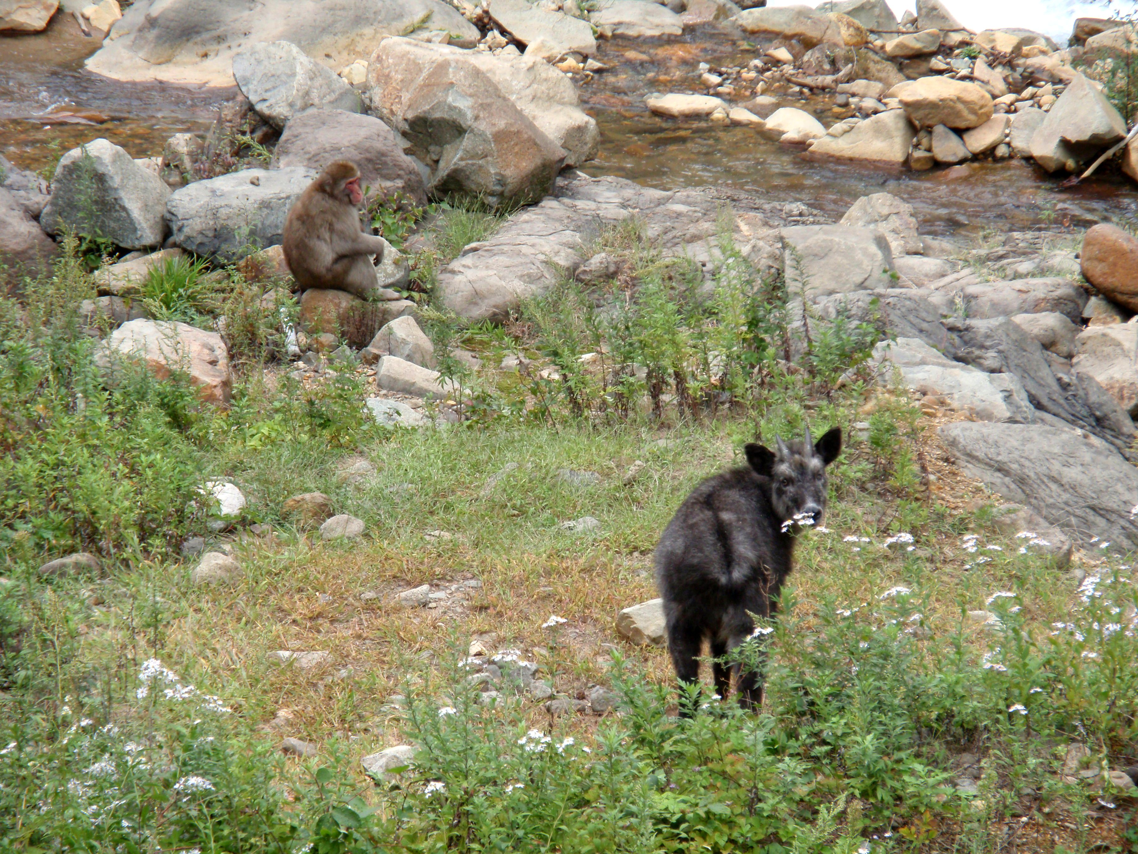 ニホンカモシカとニホンザル。長野県秋山郷で撮影。